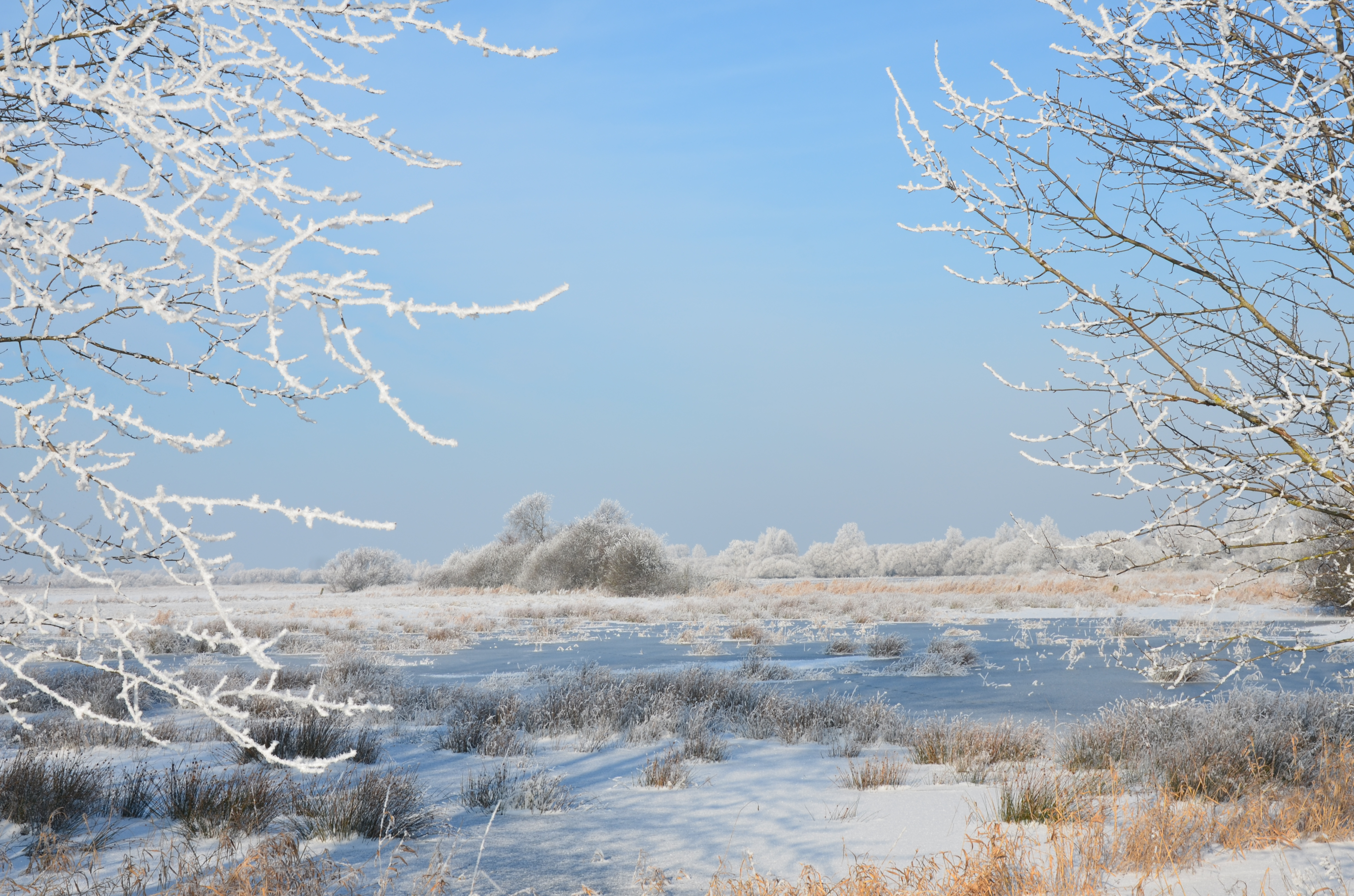 Naturschutzgebiet „Fischerhuder Wümmeniederung“ in Ottersberg, Niedersachsen – Auch die Wümmewiesen genießen den Winter, aufgenommen am „Jürgensgraben“ an der Grenze zwischen Bremen und Niedersachsen im Januar 2016